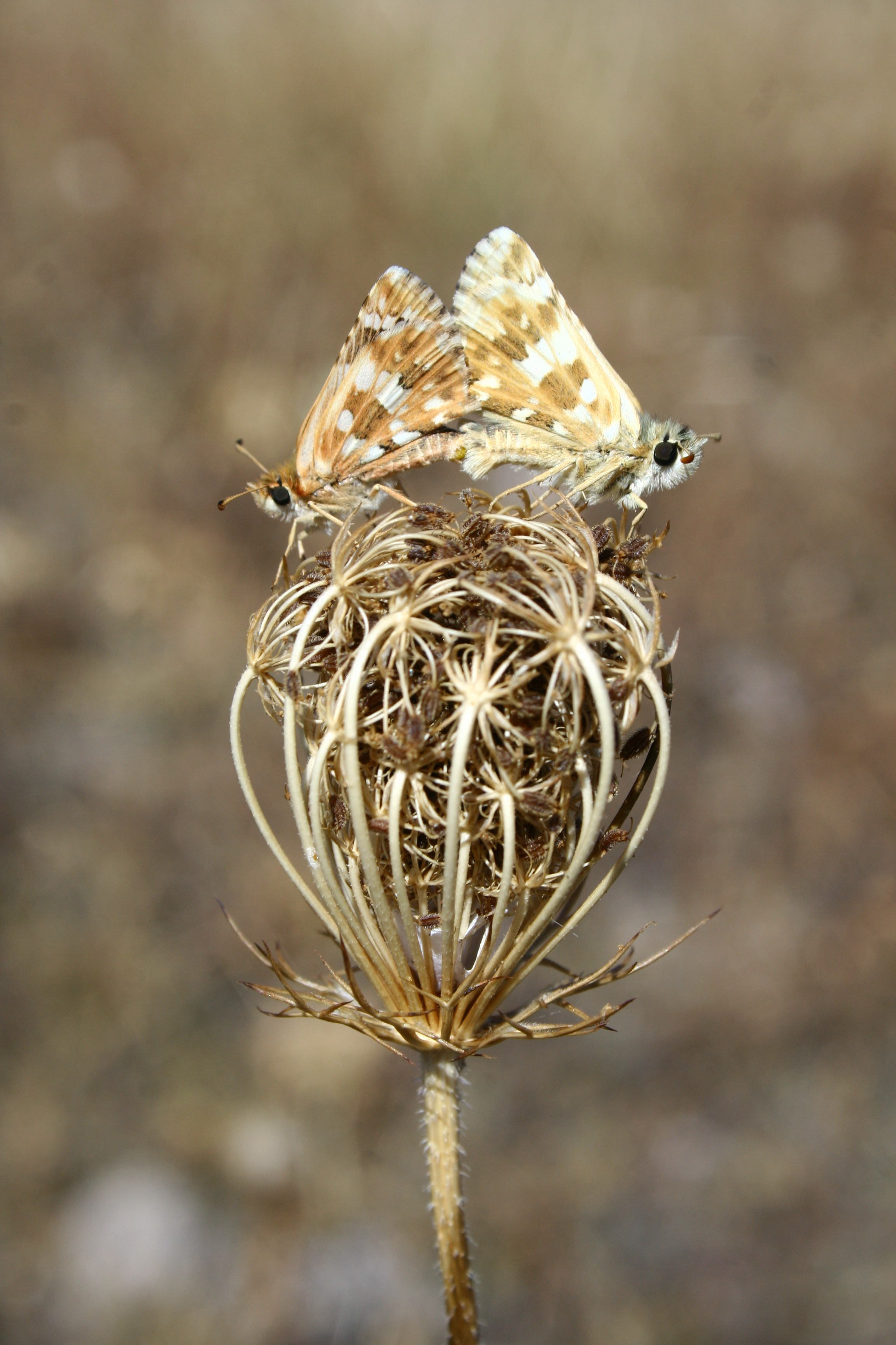 Mariposas copulando en las proximidades del embalse de Pinilla, en el Valle del Lozoya (Madrid, España).